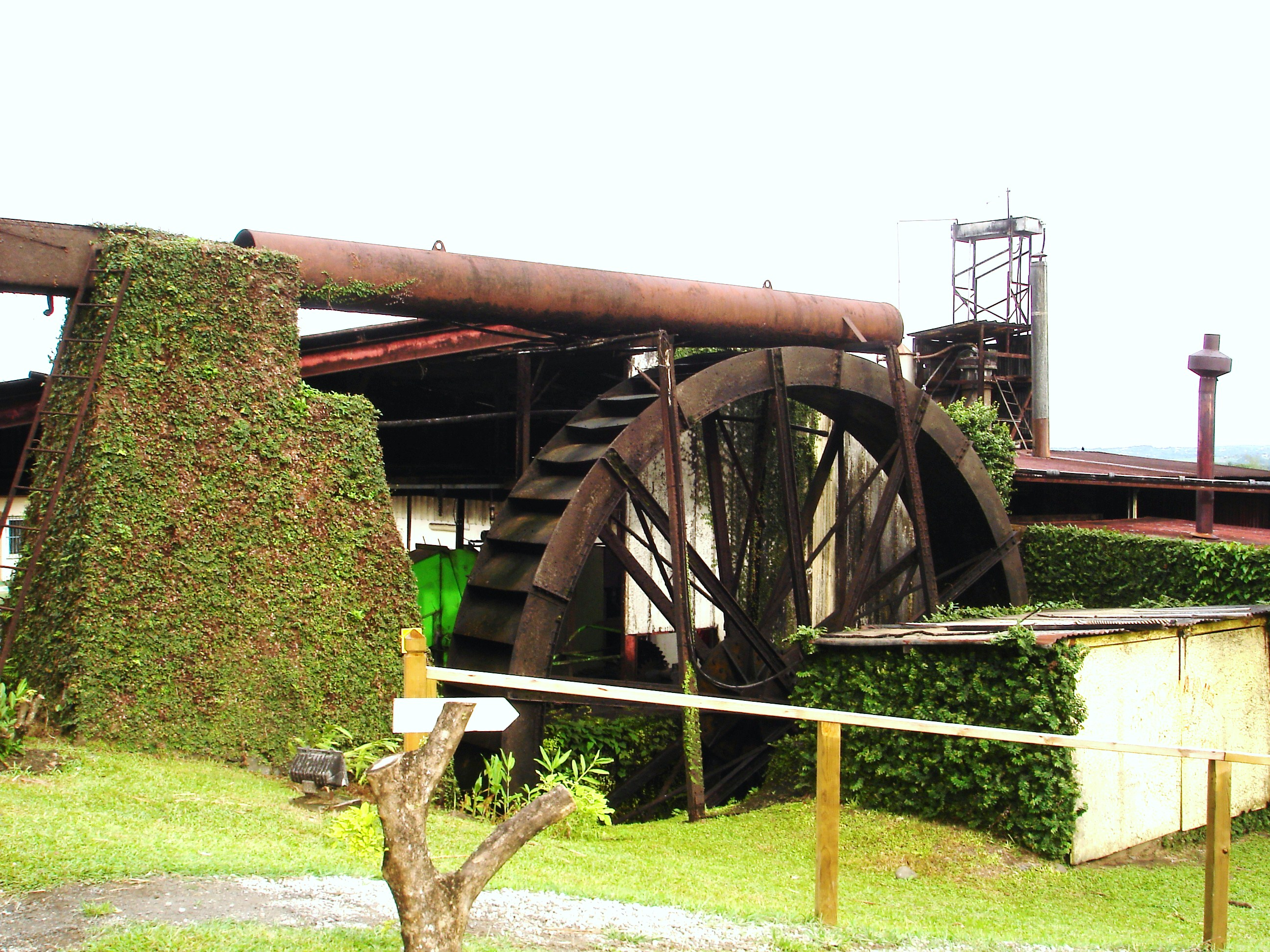 Roue à aubes, située dans la rhumerie "Domaine Severin" à Sainte-Rose en Guadeloupe - France